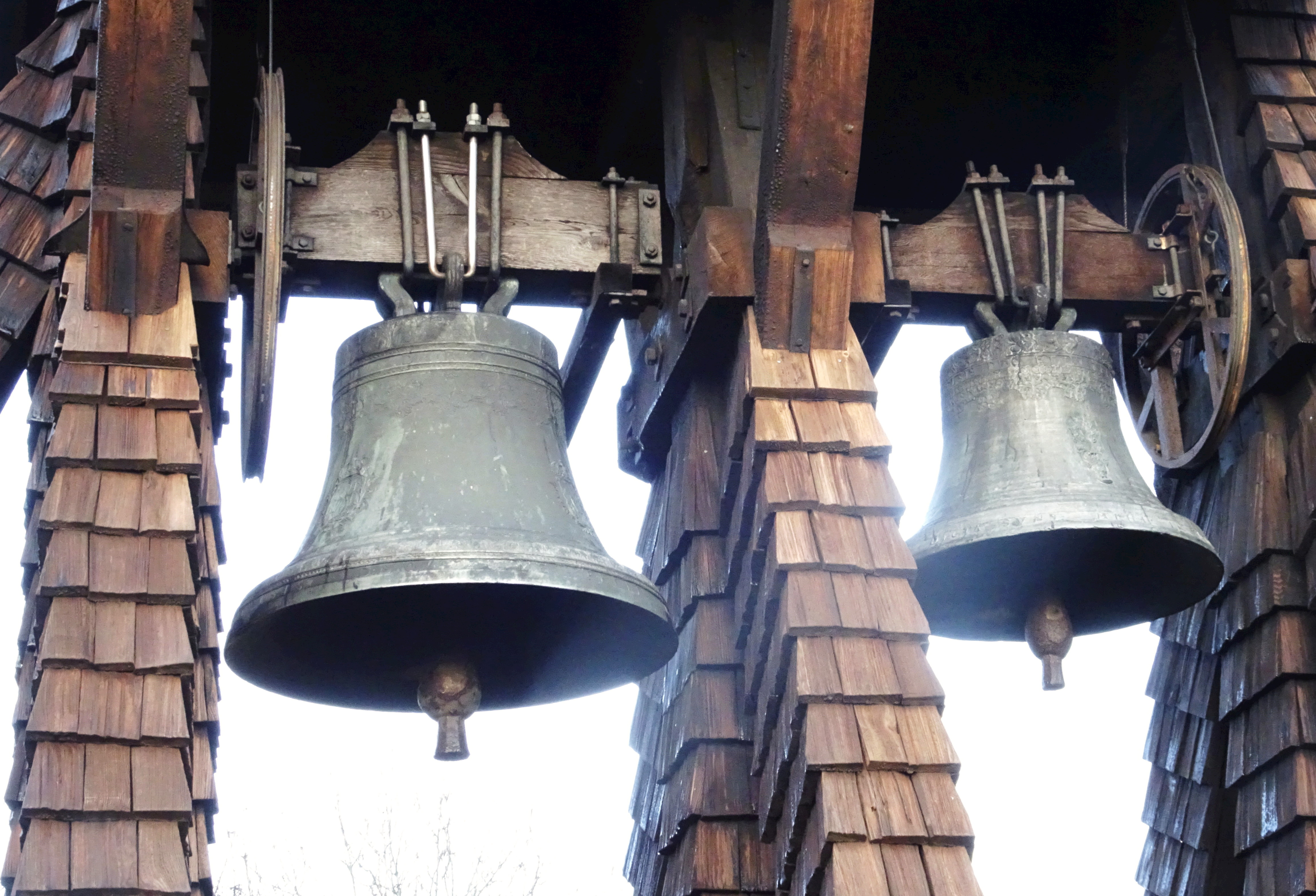 Klockstapeln på Flaggberget, Drottningholm